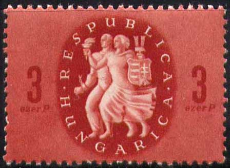 Почтовая марка Венгрии, 1946